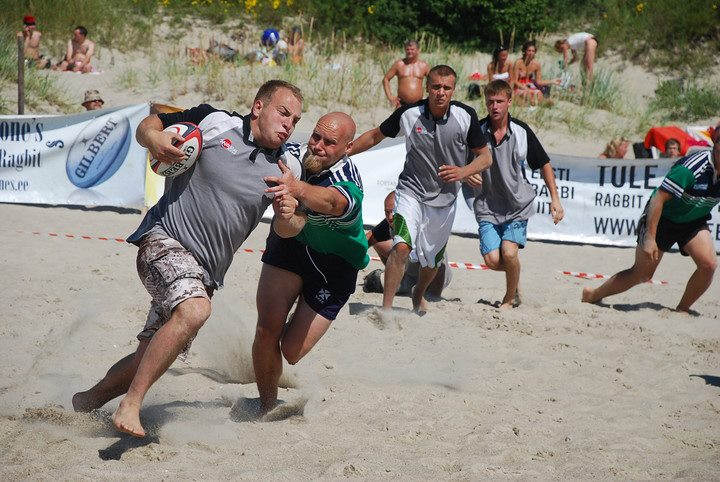 Karl - Henry Korjus // Eesti Rannaragbi Festival '09